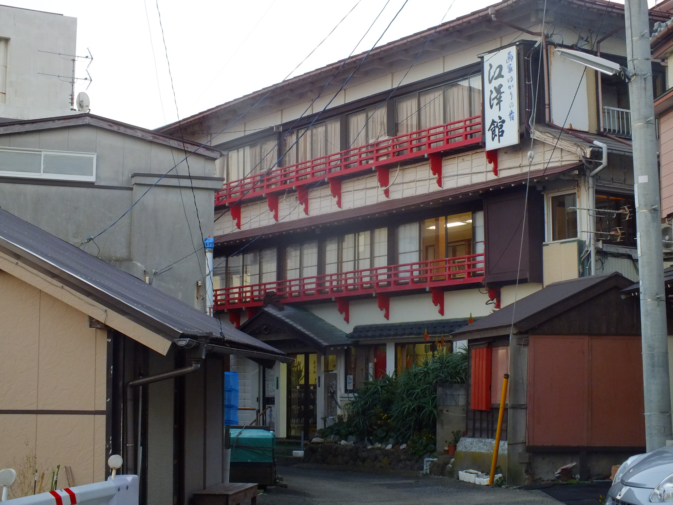 Futomihama,Kamogawa,Chiba 千葉県鴨川市太海浜